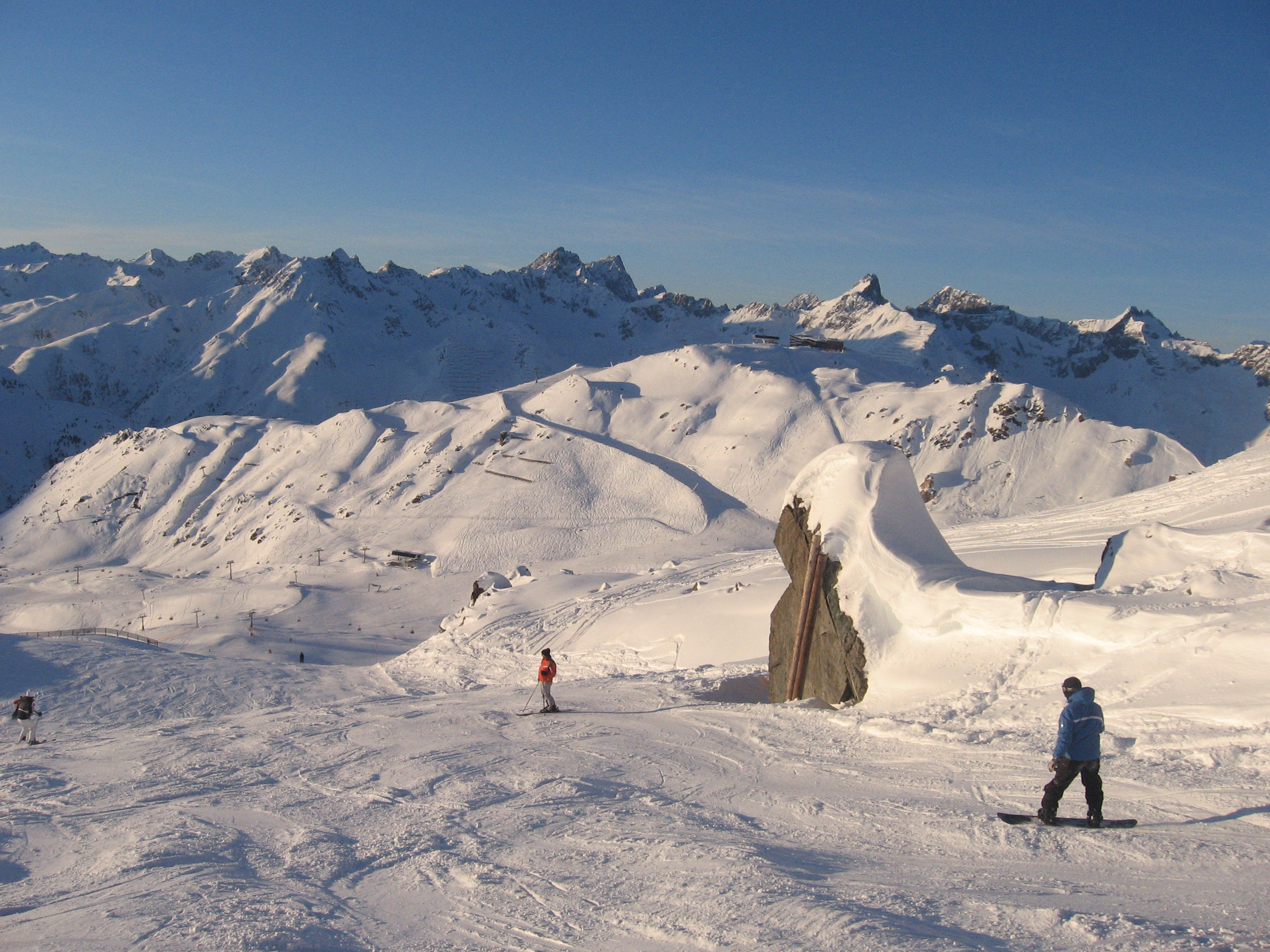 נוף מושלג באתר הסקי אישגל